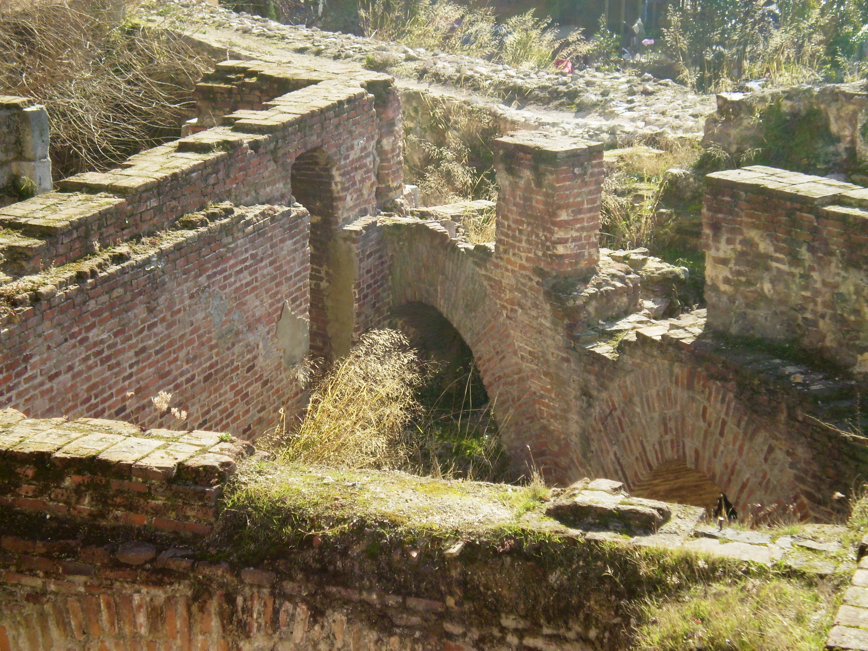 Muralla musulmana de Madrid, Spain